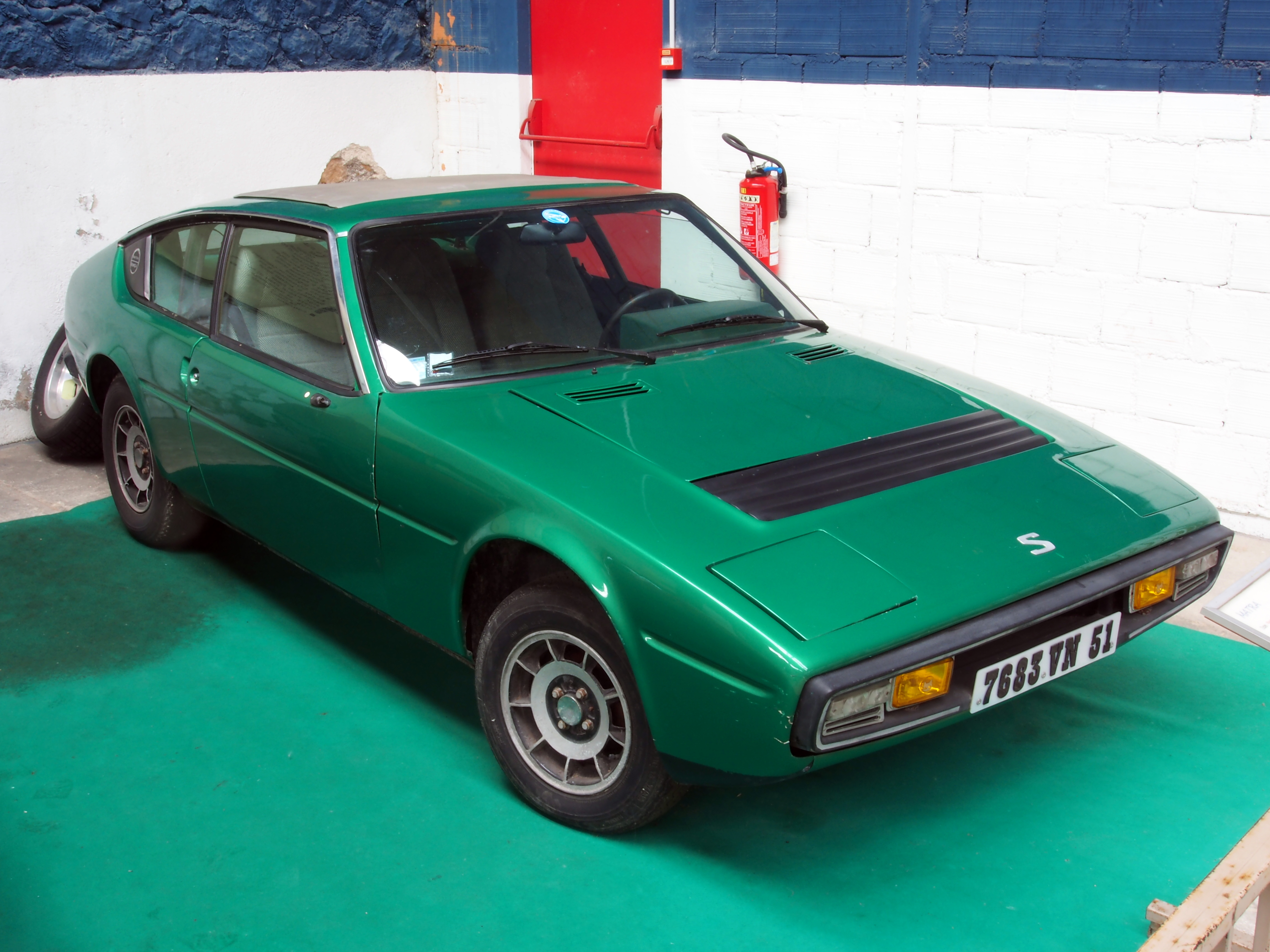 1976 Matra Bagheera S